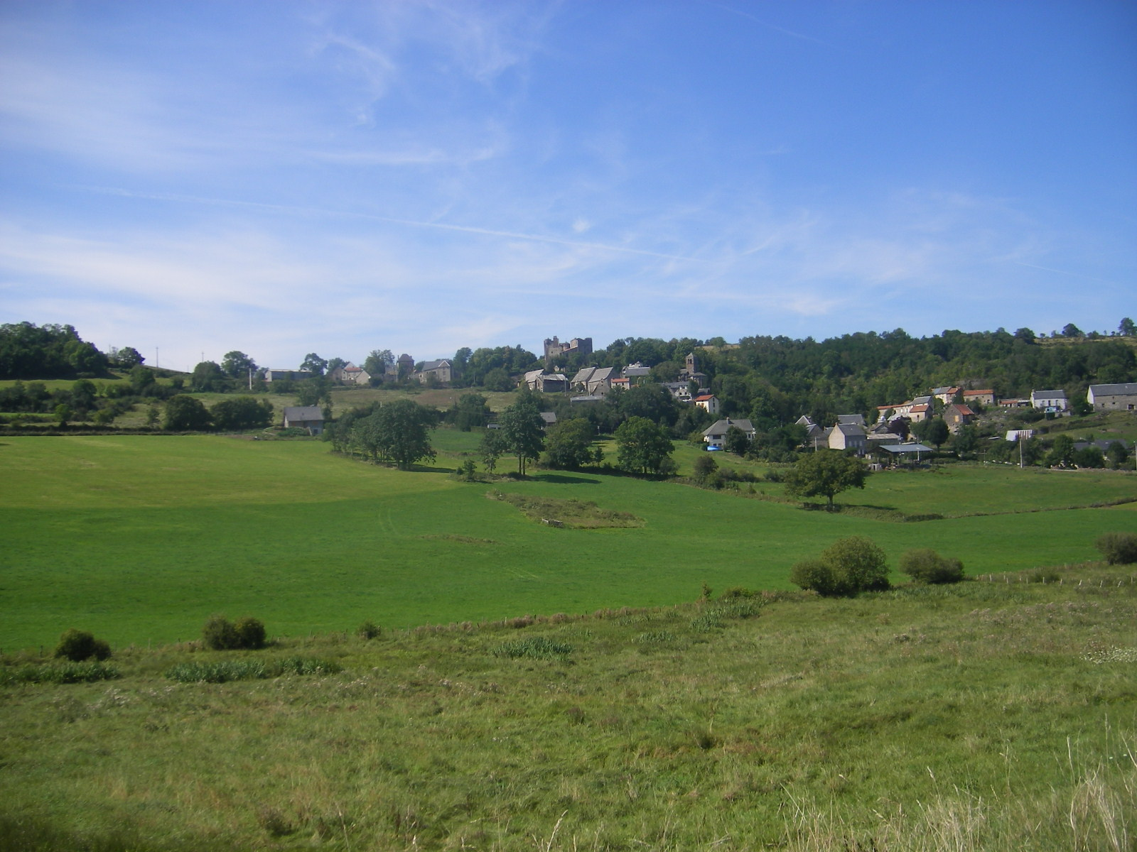 Saint-Diéry as seen from the D978 route. Comm. de Saint-Diéry, Puy-de-Dôme, France. Hameau de Saint-Diéry-Bas, vu depuis la D978 (coup d'oeil vers le nord-ouest). On distingue au haut de la colline le château médiéval de Saint-Diéry, avec sa chapelle castrale un peu plus à droite en contrebas.